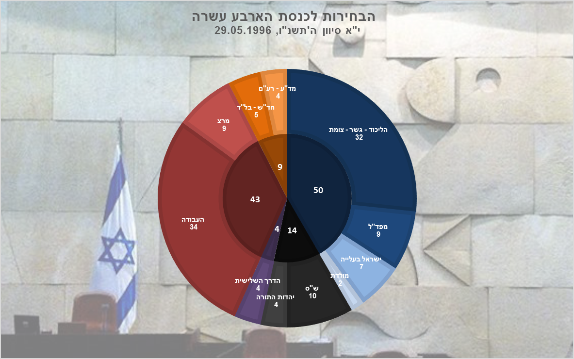 תוצאות הבחירות לכנסת הארבע עשרה